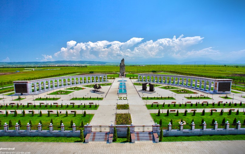 Мемориал памяти и славы в Назрани